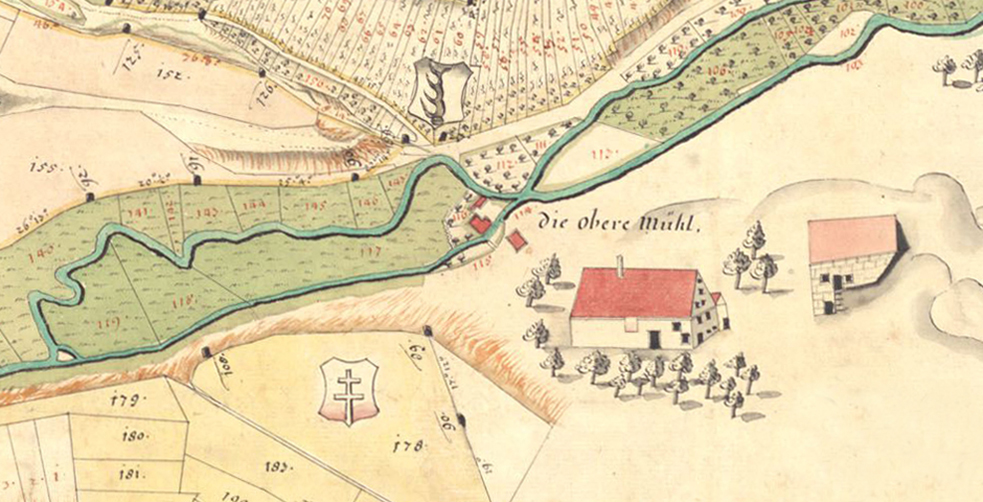 Lage der Oberen Mühle auf der Markgröninger Aussfeldkarte von 1752